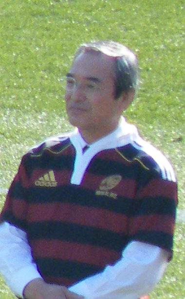 第50回全国大学ラグビーフットボール選手権大会の記念セレモニーに登場した神山郁雄氏。